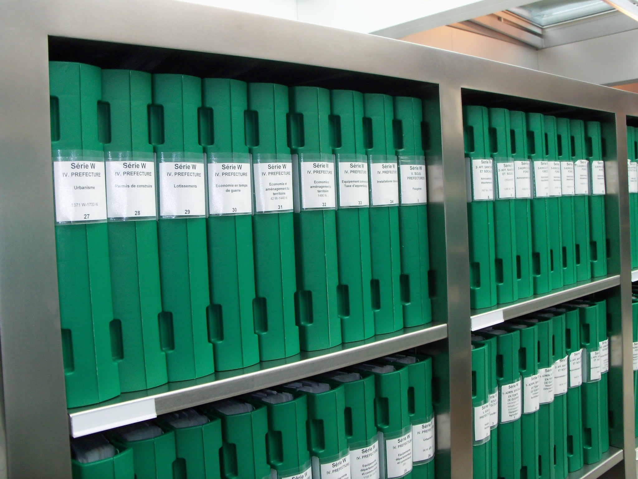 Partie des répertoires de la série W dans la salle de lecture des Archives départementales d'Ille-et-Vilaine.